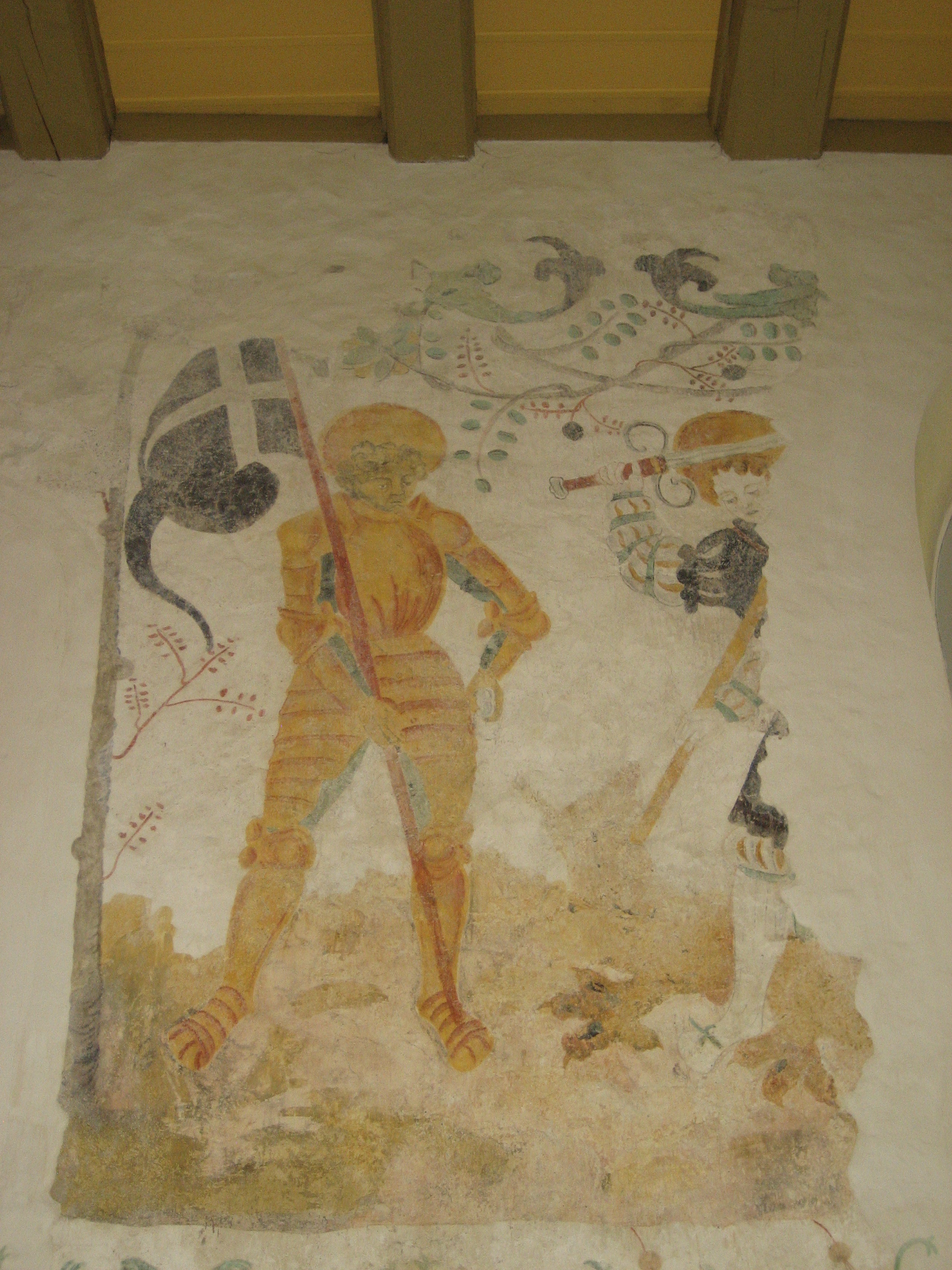 Der Innenraum der Kirche von Zerrenthin mit dem Wandmalereizyklus aus Apostel und Heiligen an der Südwand.